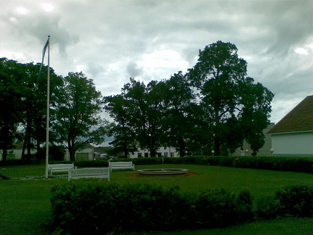 Purskkaev Pürksi mõisa pargis.